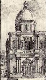 Church Messina Chiesa di San Giovanni Battista dei Gesuiti